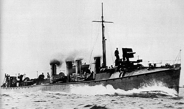 Der britische Zerstörer HMS HORNET